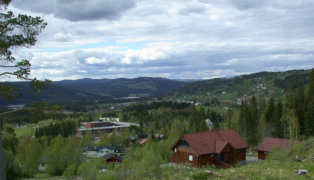 Snertingdal